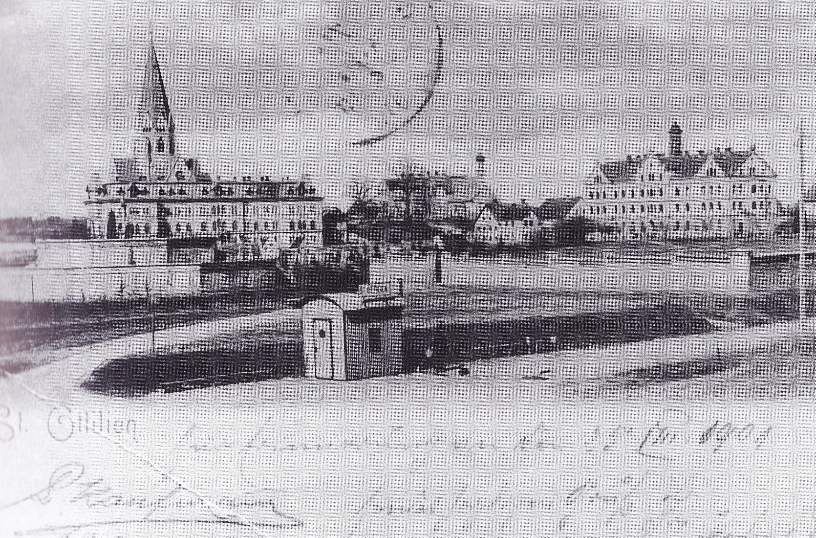 Haltepunkt St. Ottilien mit der als Stationsgebäude dienenden Wellblechhütte im Jahr 1900, im Hintergrund das Kloster St. Ottilien